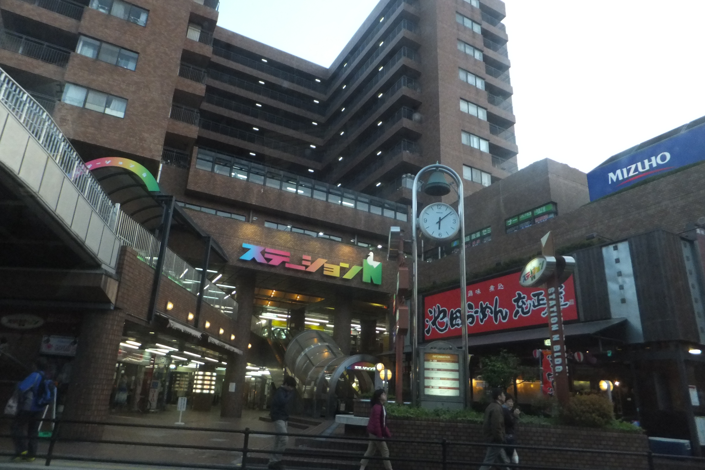 シティーハイツ池田駅前ビル